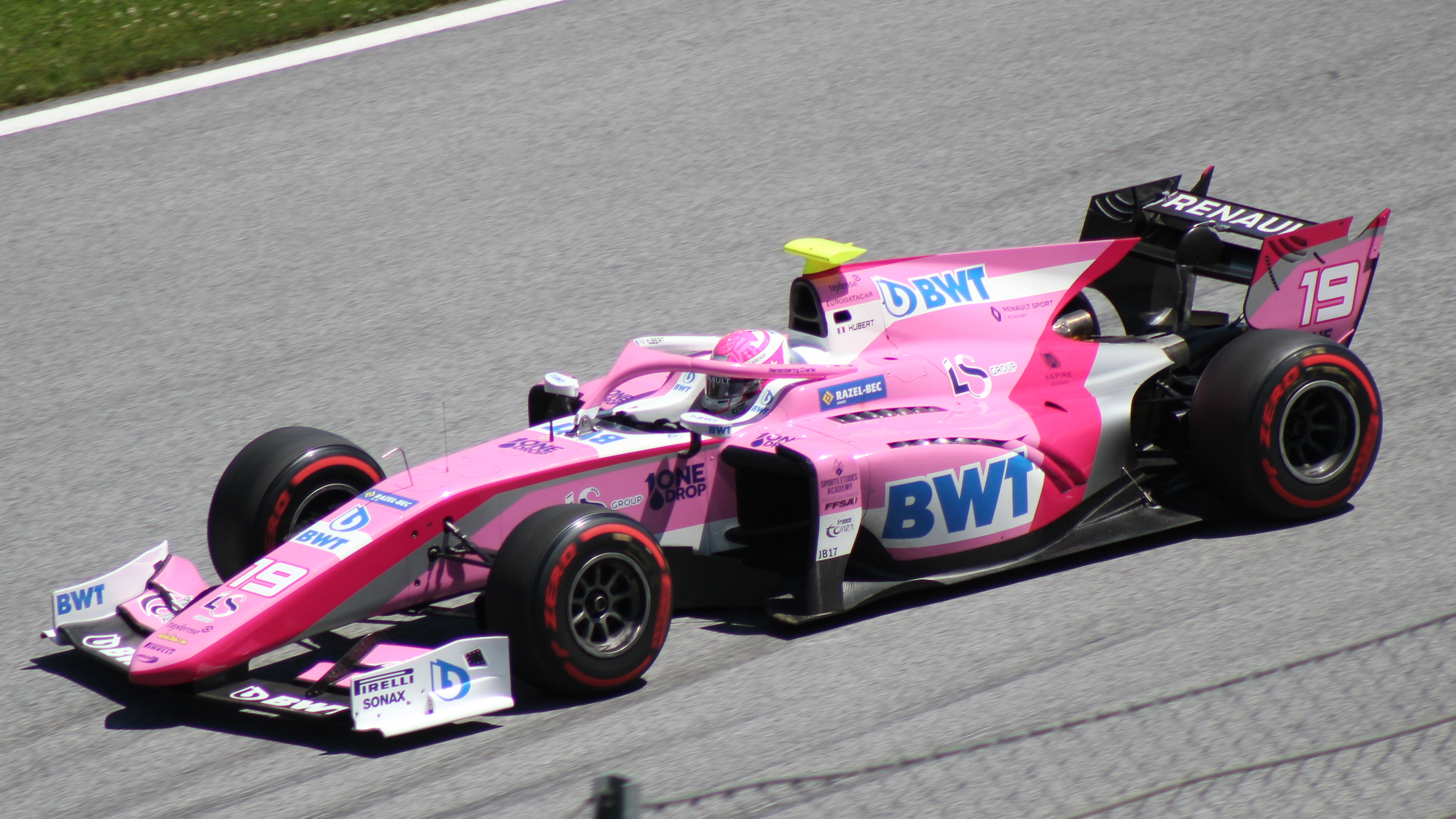 Hubert beim Rennwochenende in Österreich 2019